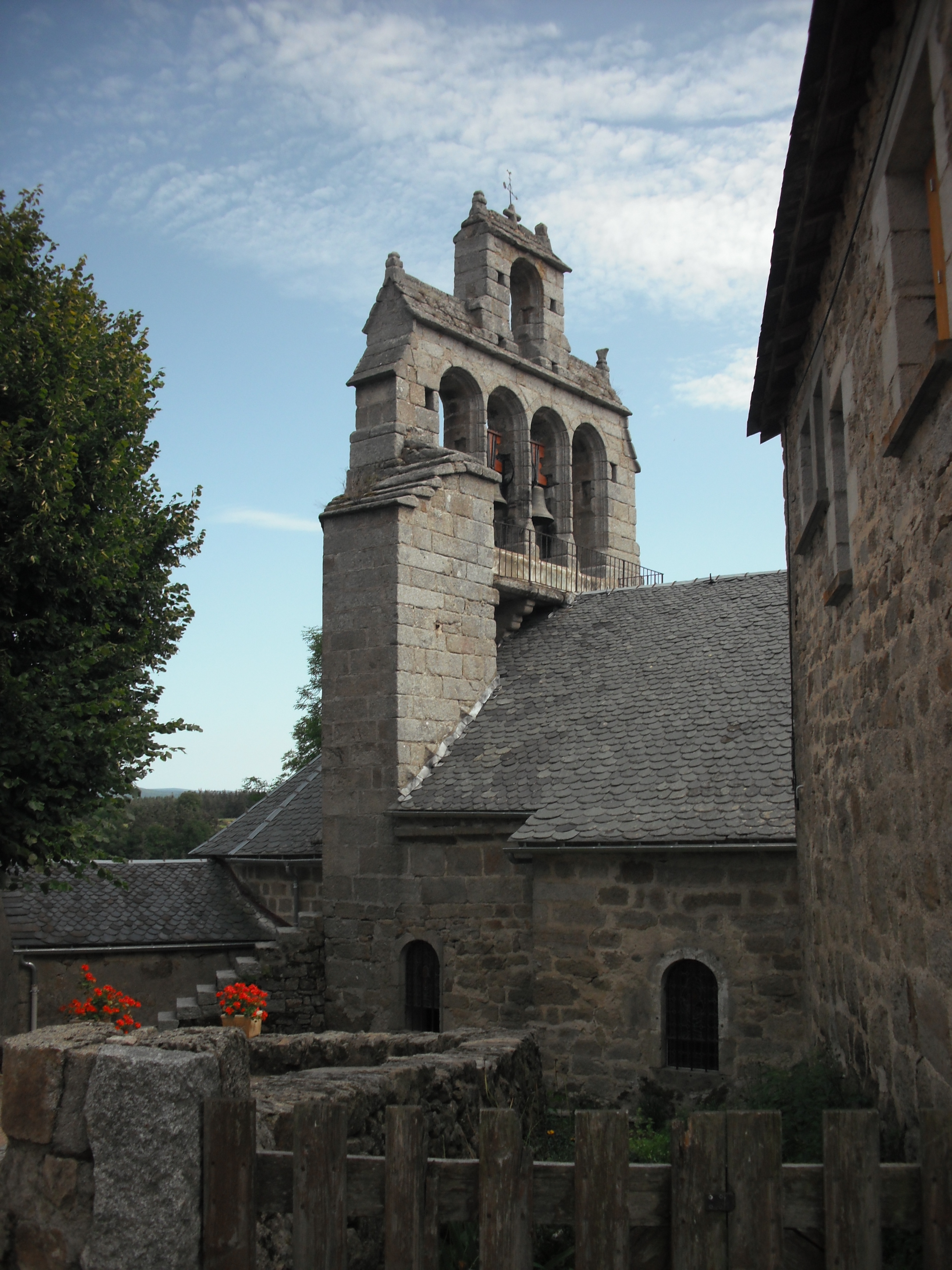 Eglise de Blavignac